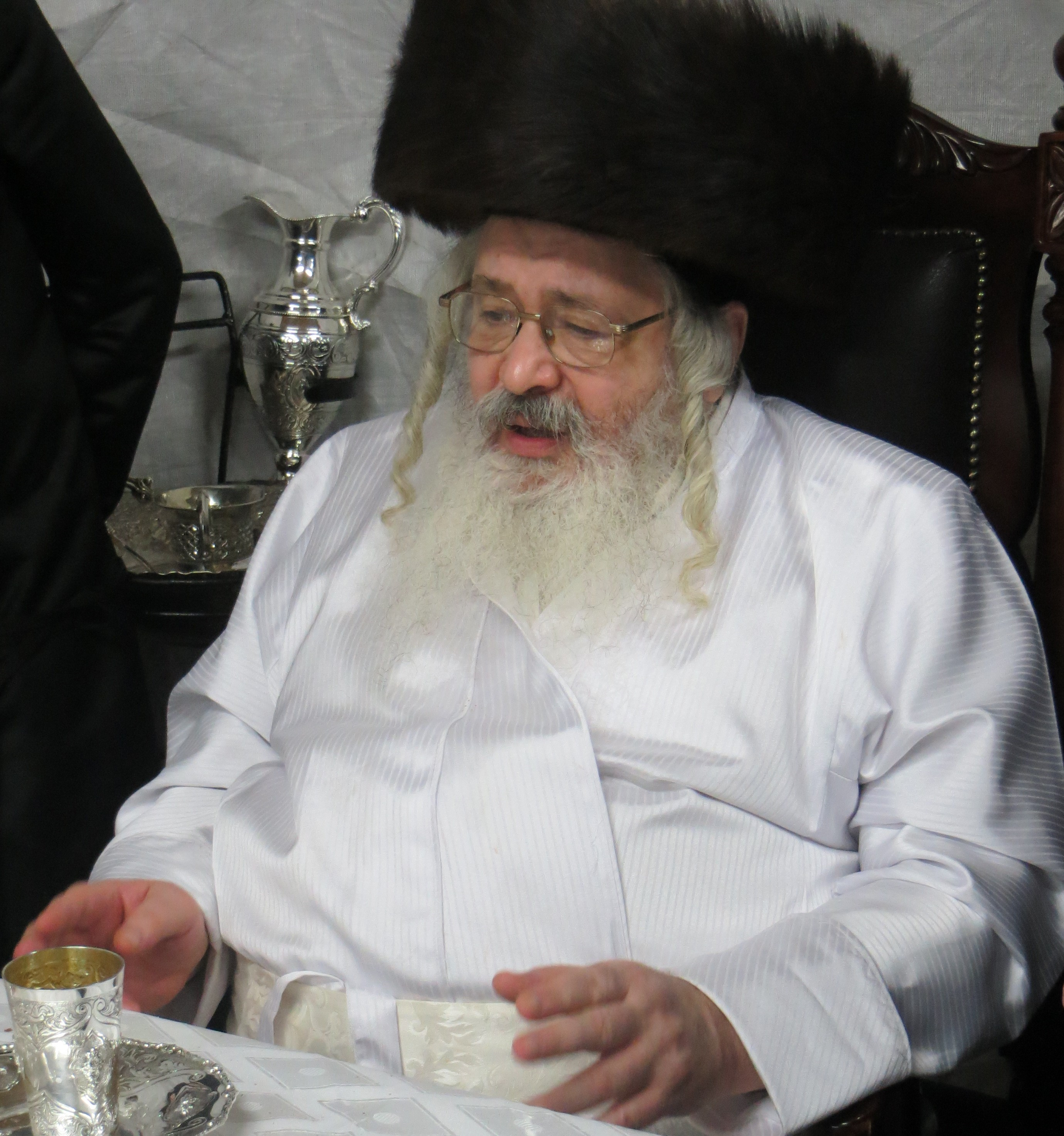 האדמו"ר משומרי אמונים שליט"א בעריכת השולחן בבית מדרשו בבני ברק